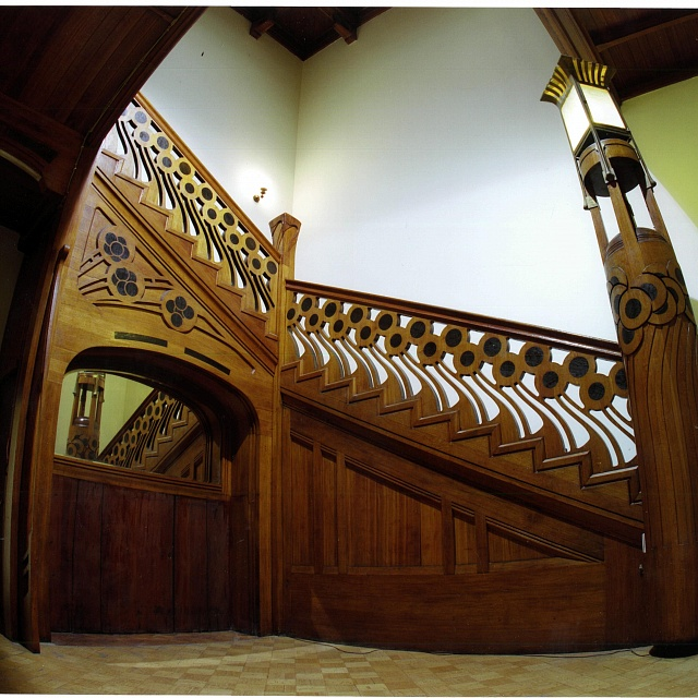 Лестница в особняке А. И. Дерожинской по адресу Кропоткинский переулок, 13, стр. 1. Дом был построен в 1901-1904 гг. по проекту Фёдора Шехтеля, является лучшим образцом московского модерна. Отреставрирован в 2009-2013 гг., с 1959-го принадлежит посольству Австралии